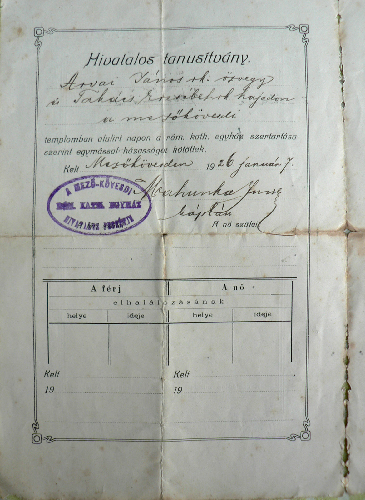 Egy oldal Árvai János családi lapjából, Mahunka Imre káplán aláírásával